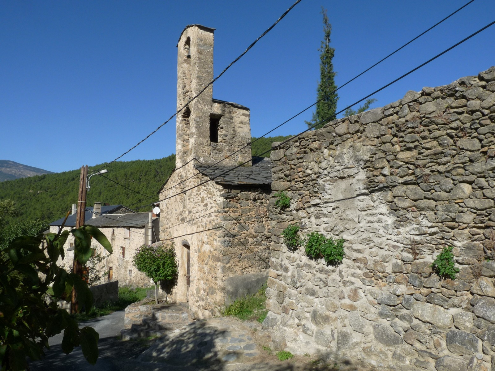 Chapelle d'Aytua, Pyrénées-Orientales, France